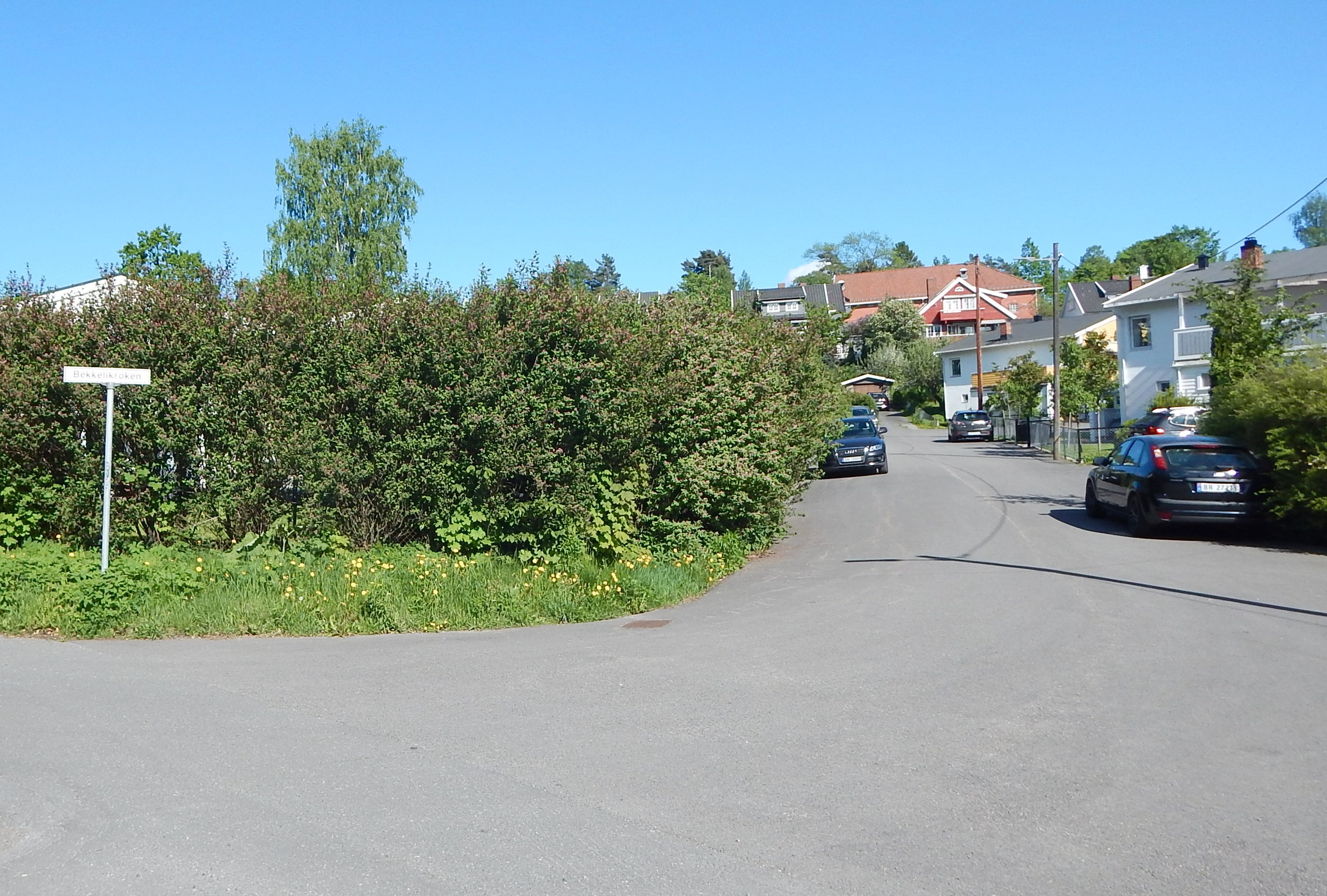 Bekkelikroken